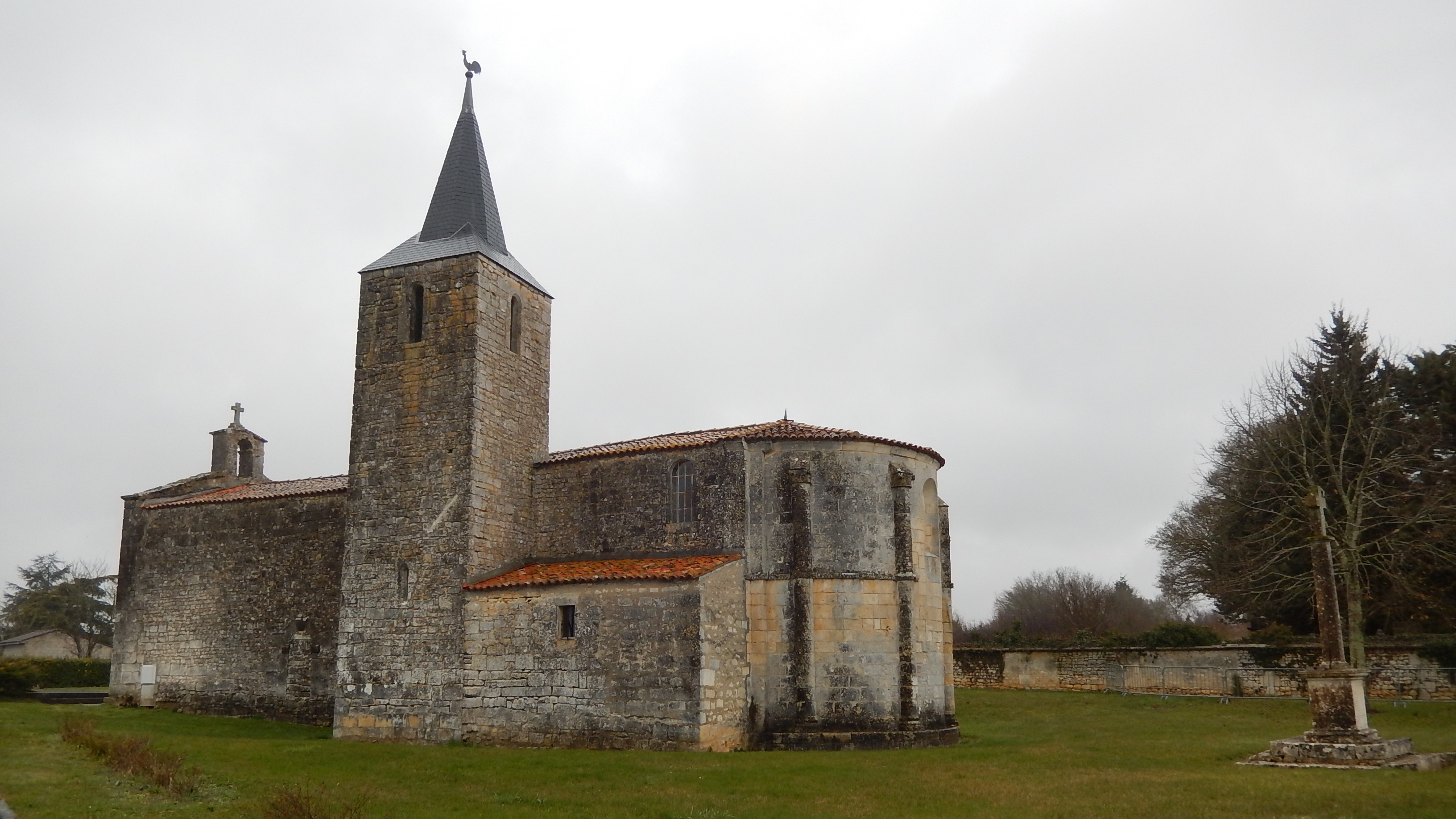 L'église de Saint-Vaize (Charente-Maritime, France) photographiée par temps gris. À droite, une croix en pierre.